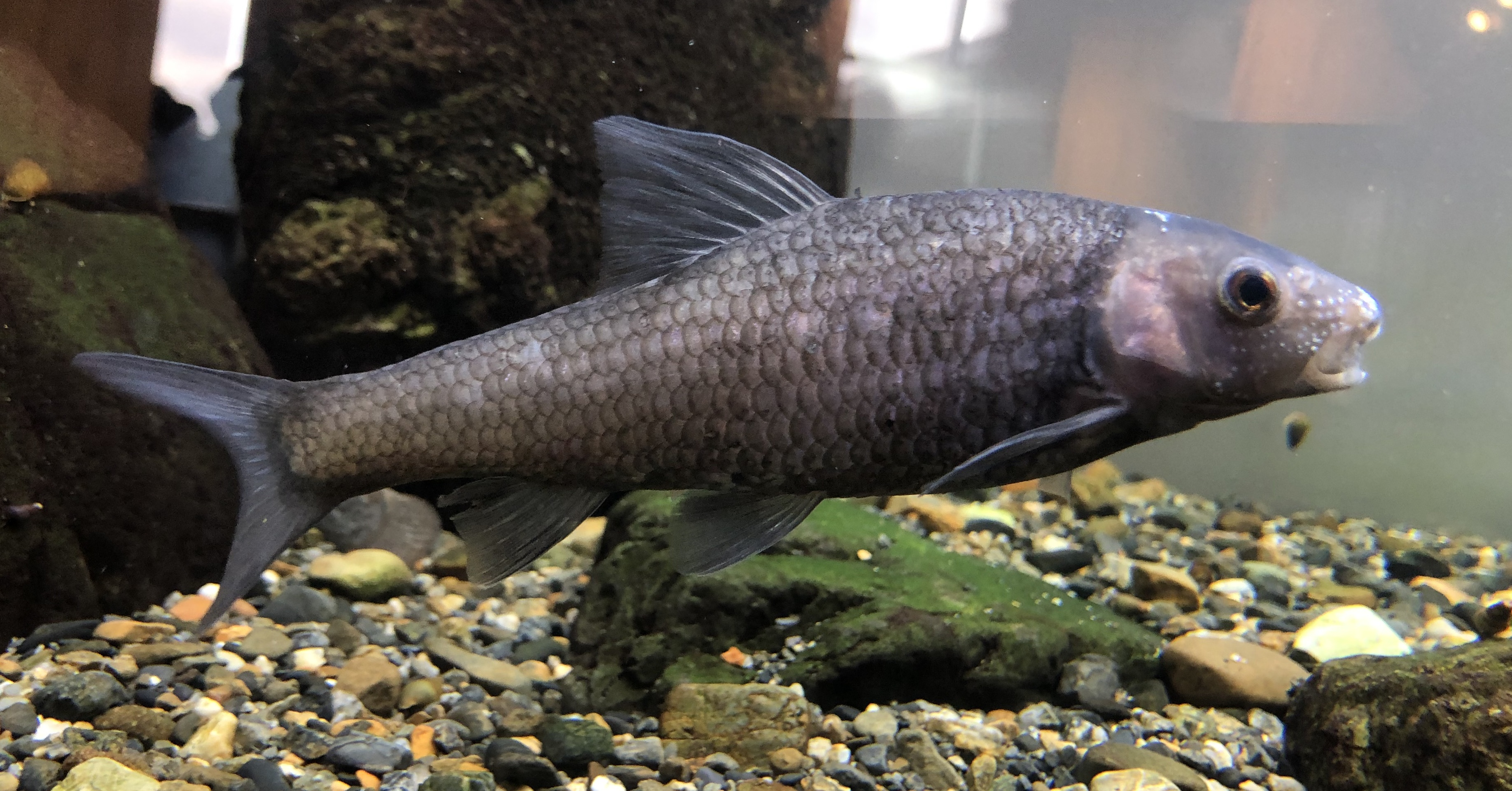 アブラヒガイ。京都水族館飼育個体。